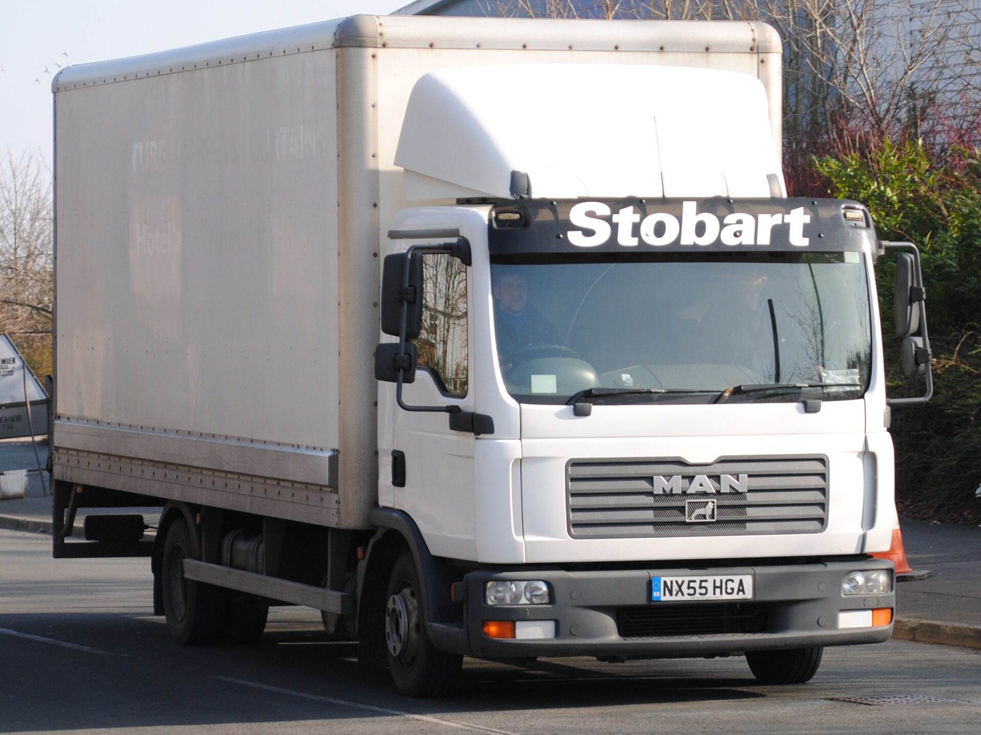 MAN. seen here in Hawleys Lane, Warrington